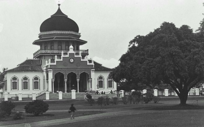 Foto. De Baiturrahman moskee in Koetaradja